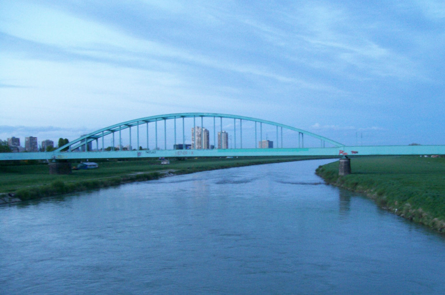 Željeznički most Zagreb